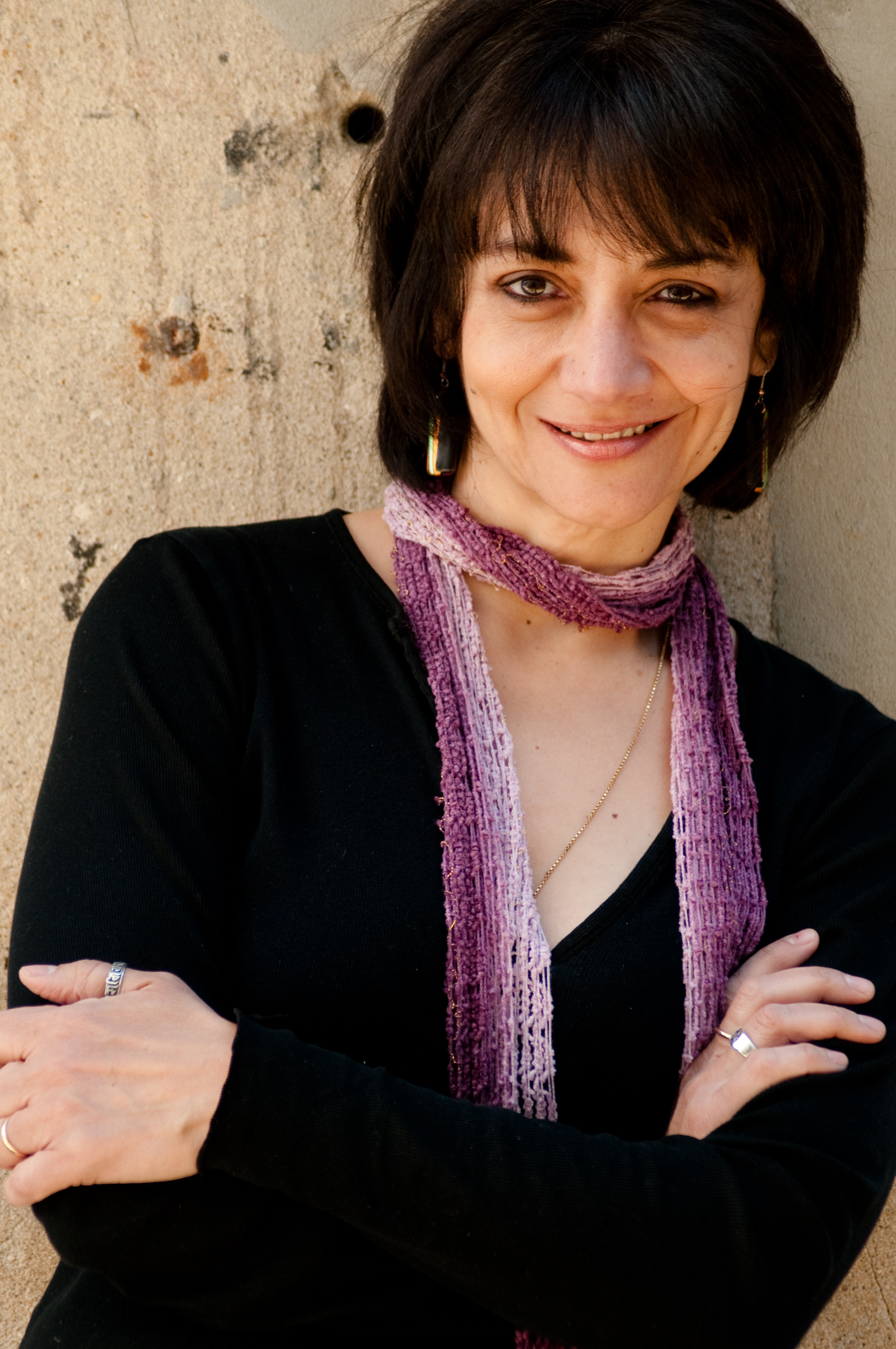 Susana Amundarain